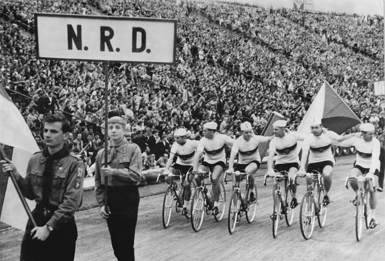 Friedensfahrt, Mannschaft der DDR, Eröffnung Zentralbild Gö-Qu 5.5.1961 XIV. Internationale Friedensfahrt Warschau -Berlin Prag . UBz: Die Mannschaft fährt bei der Eröffnung ins Stadion ein. vlnr: Eckstein, Höhne, Hagen, Schur, Weissleder, Adler.